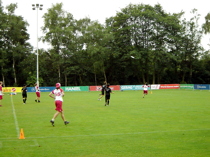 Ultimate Länderspiel Deutschland-Kanada, World Games 2005 Duisburg, Vorrunde